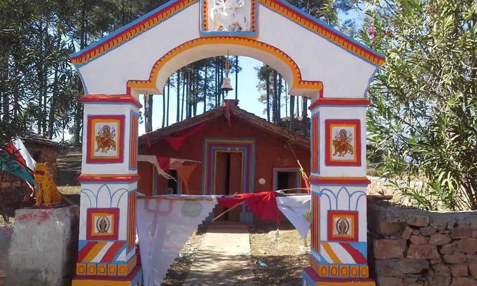 kalika tample in Baitadi